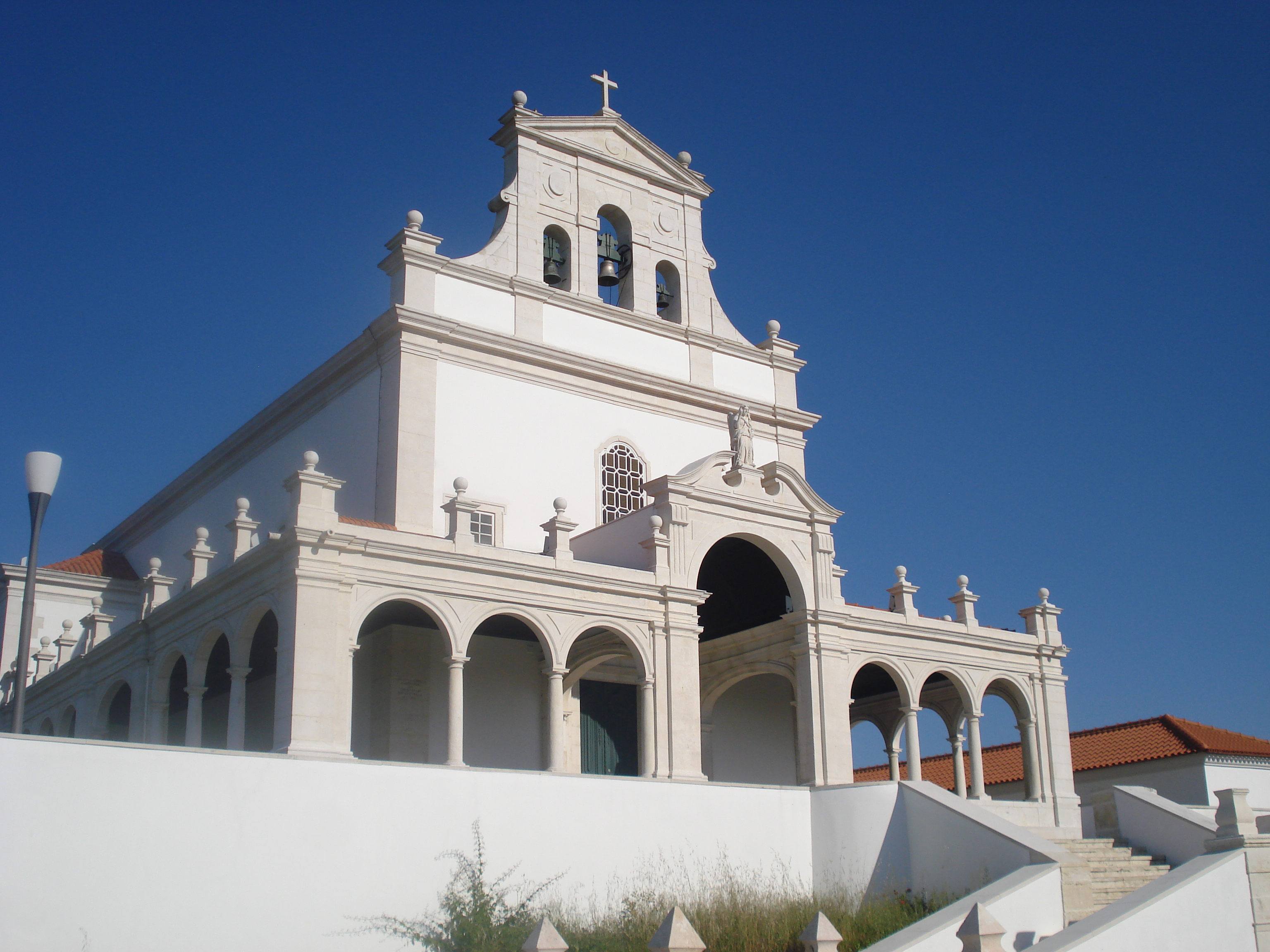 Capela da Nossa Senhora da Encarnação, em Leiria